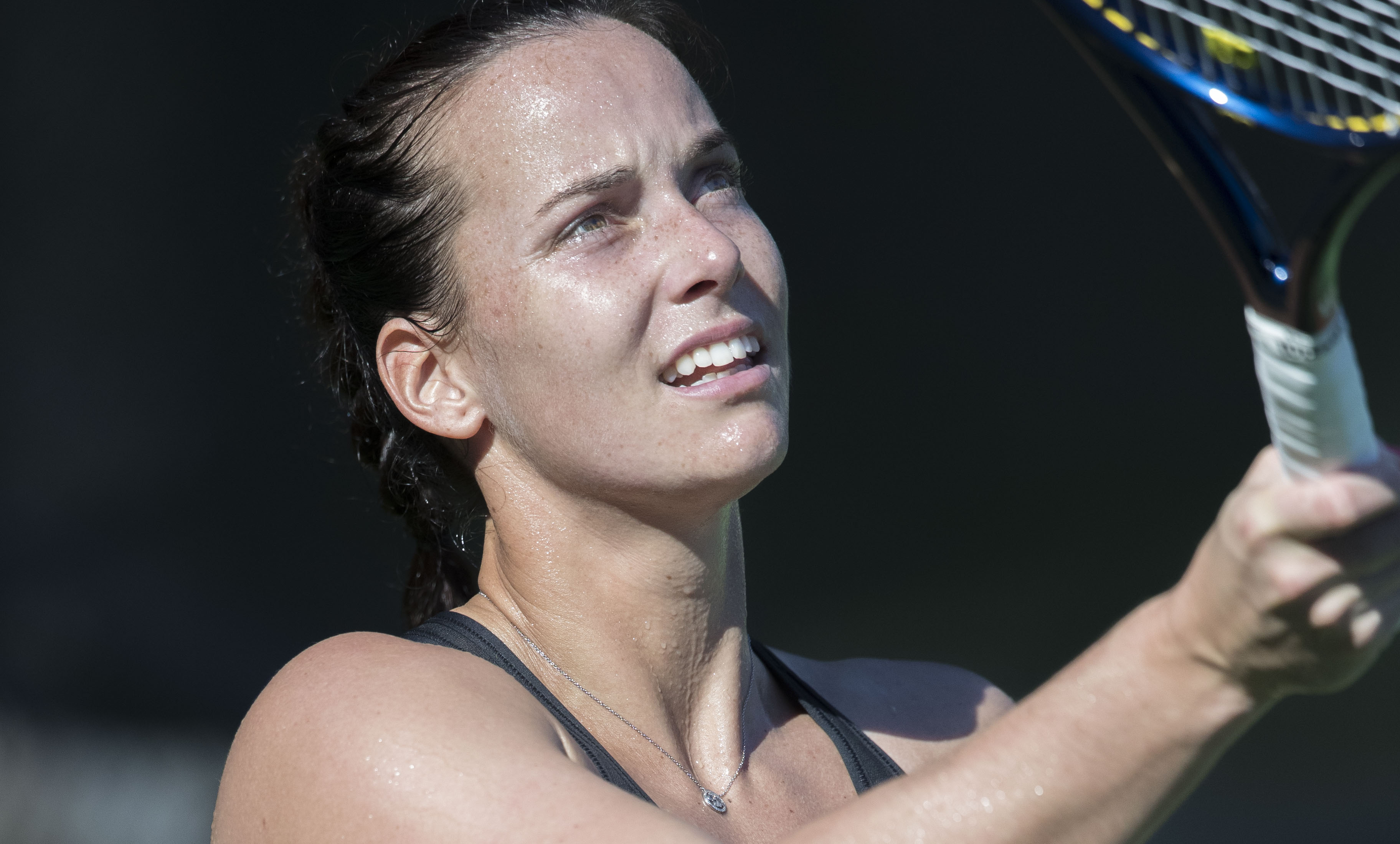 2016 Citi Open